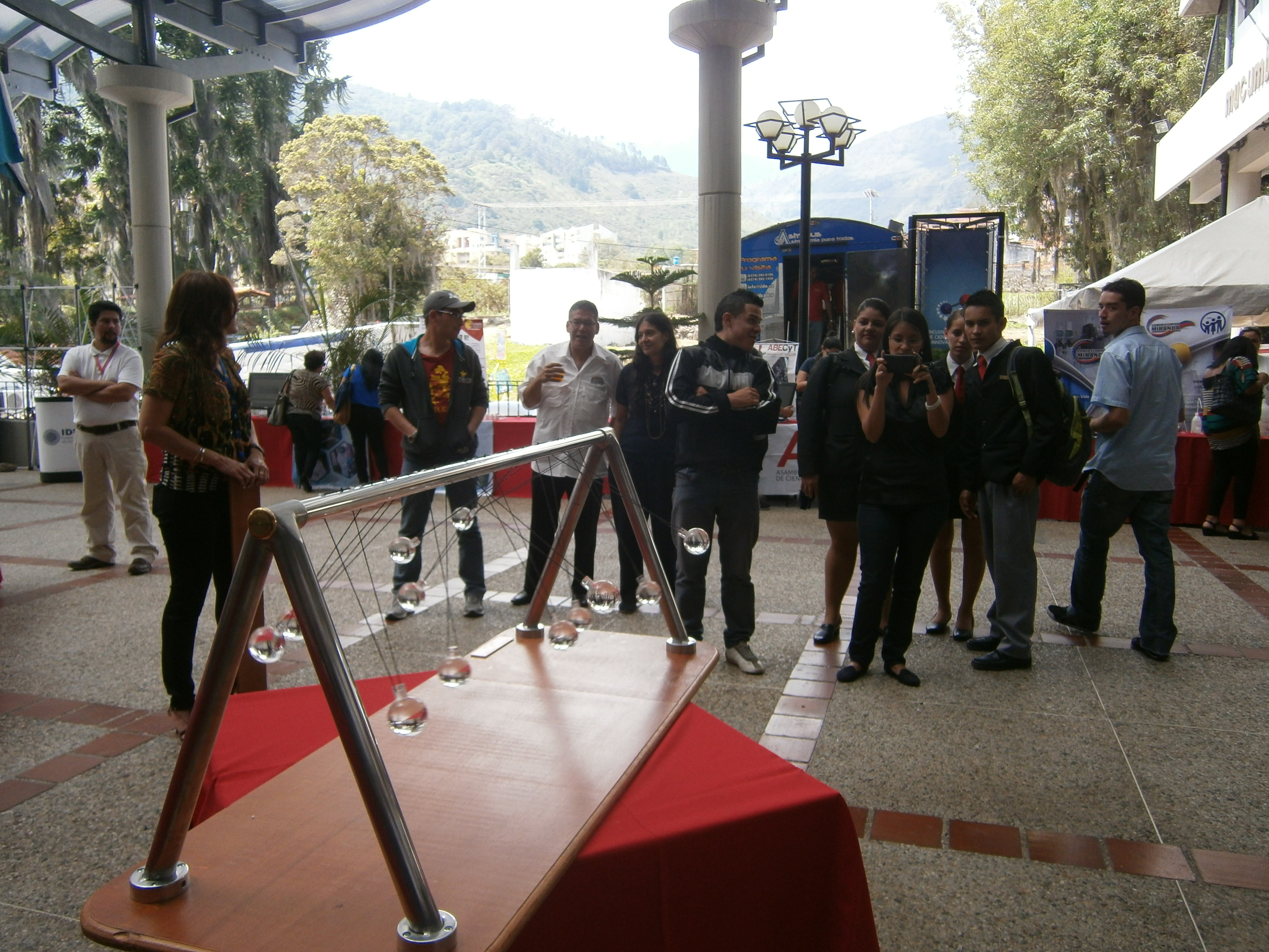 Demostración